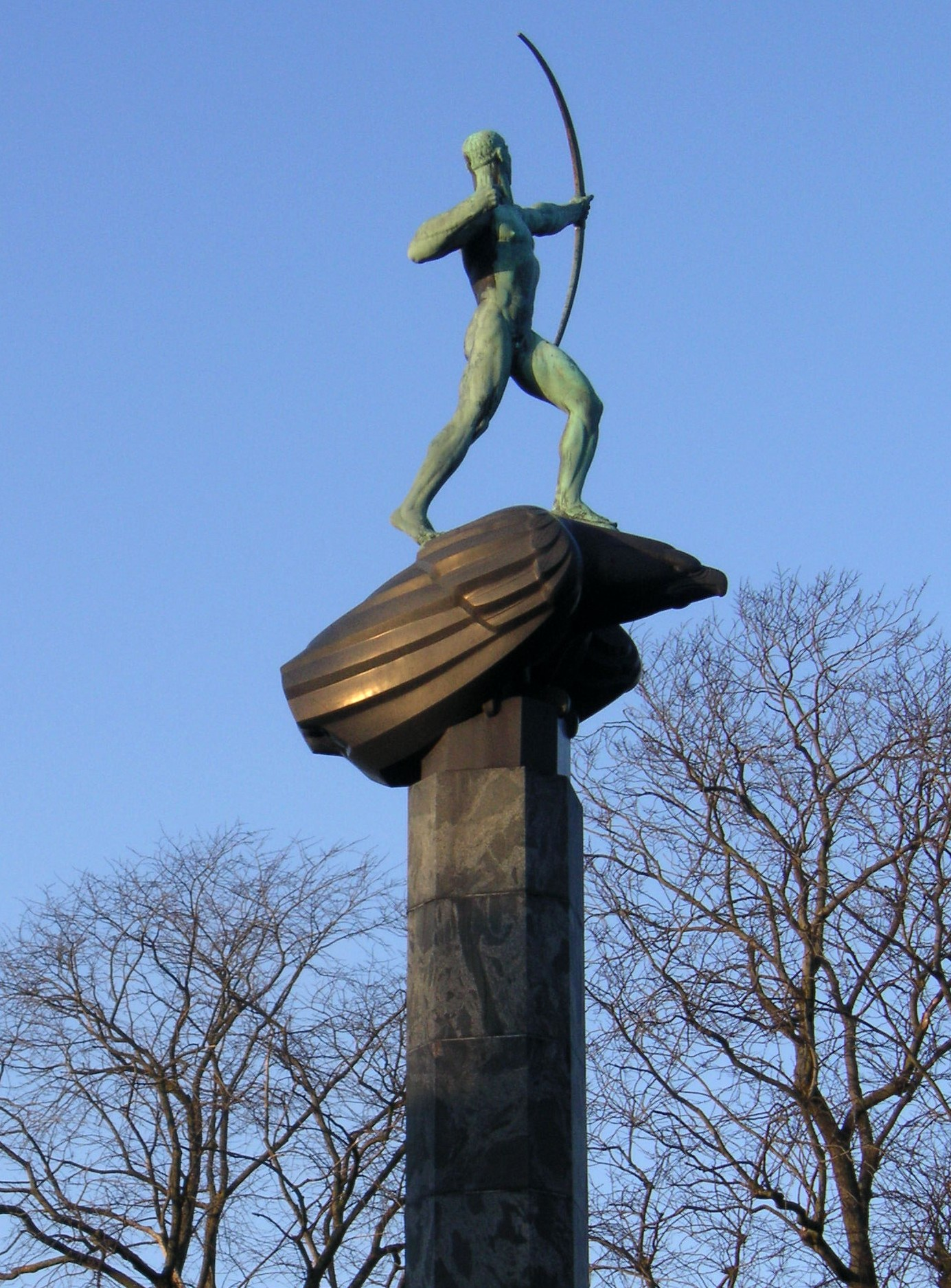 Carl Milles "Bågskytte" vid Liljevalchs konsthall i Stockholm